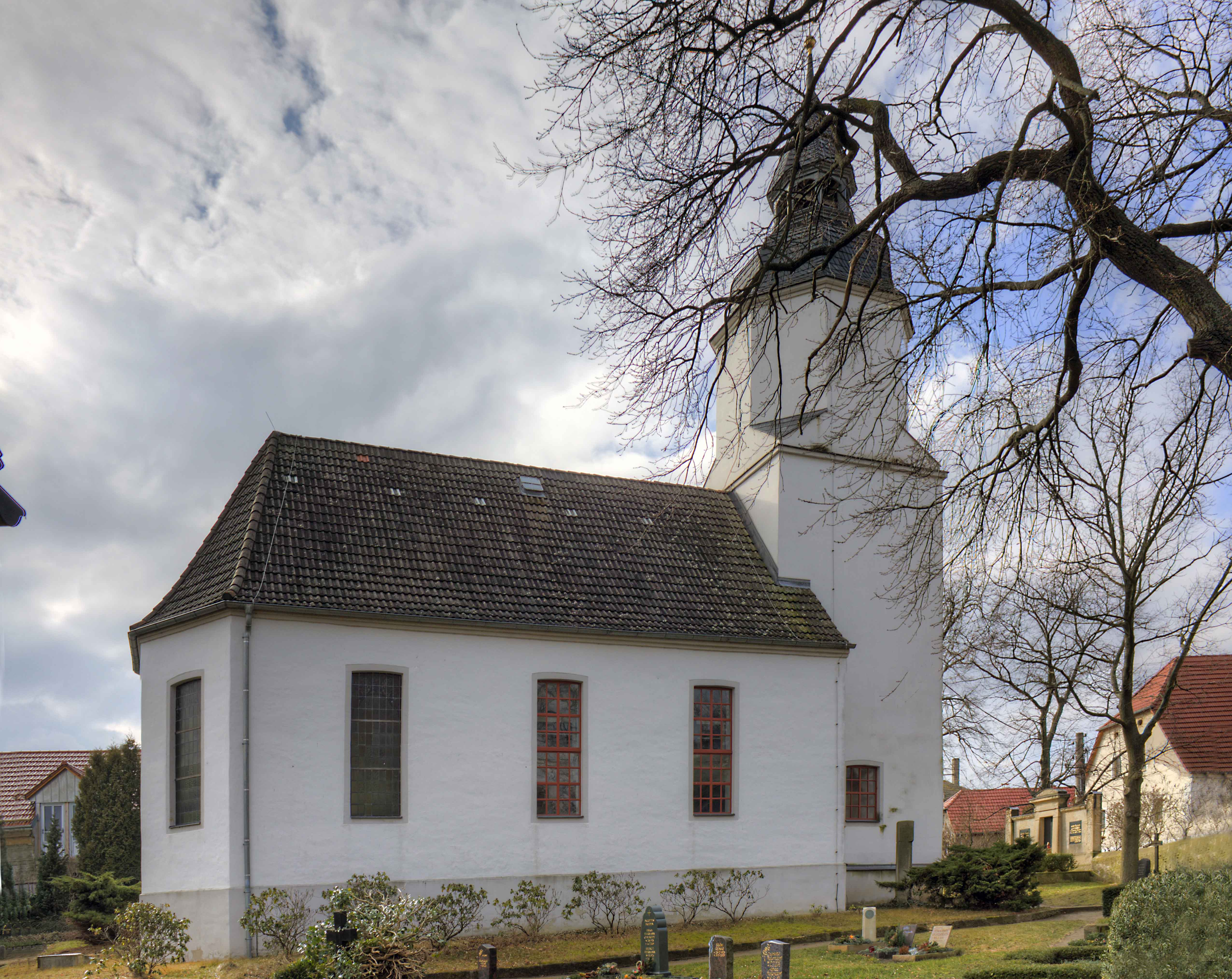 Kirche, Leutewitzer Dorfstraße in Riesa Stt. Leutewitz